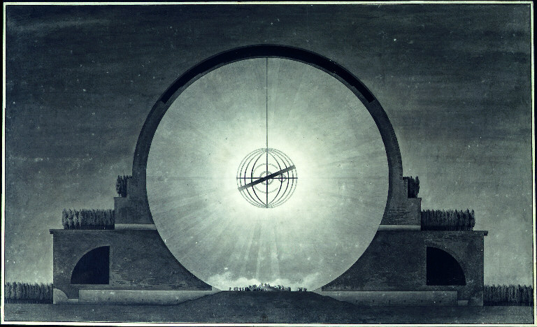 Projet de cénotaphe à Isaac Newton - Vue en coupe